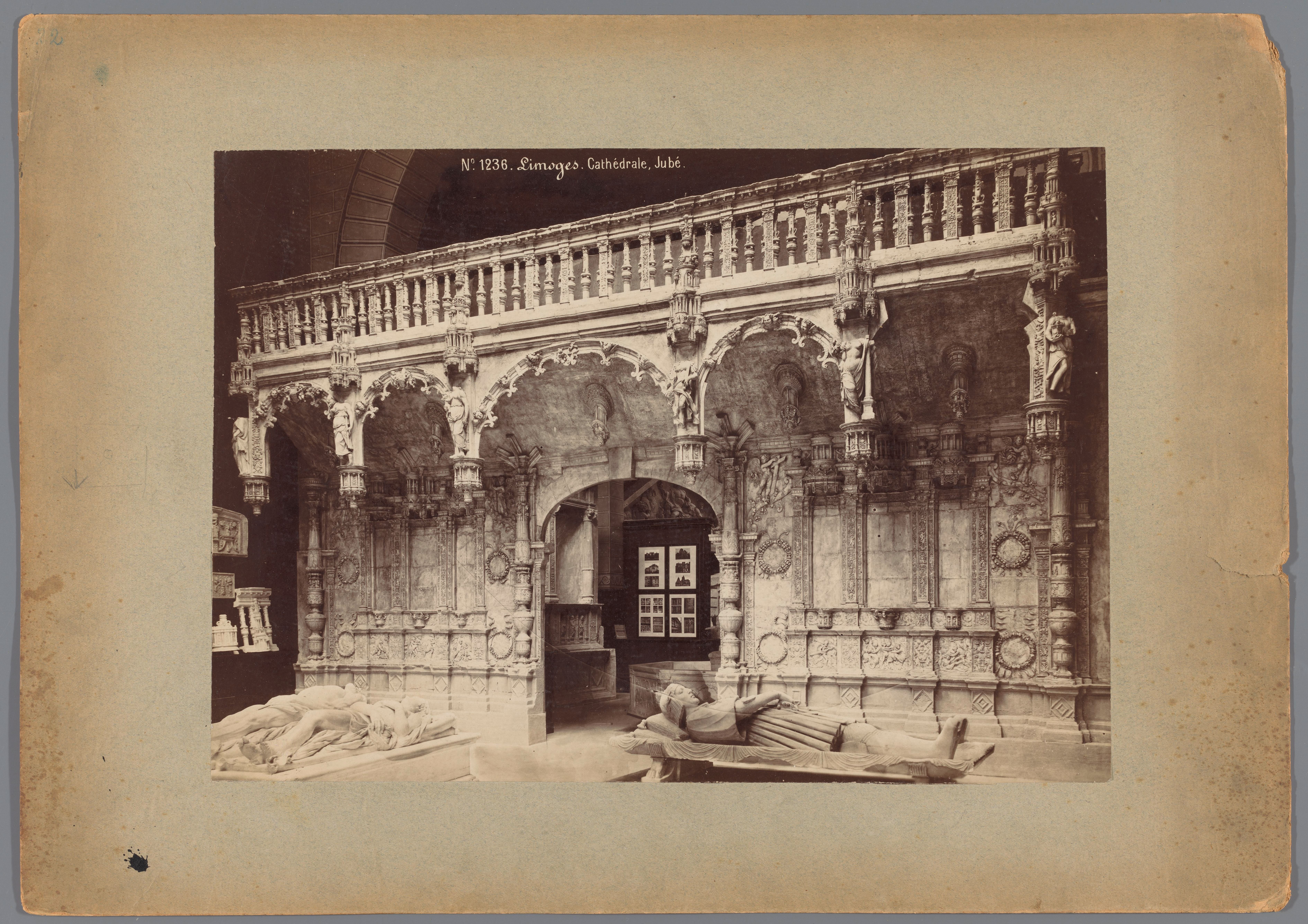 IdentificatieTitel(s): Opstelling van een gipsafgietsel van het oksaal uit de Kathedraal van Limoges in het Musée des Monuments français te ParijsLimoges. Cathédrale, Jubé. (titel op object)Objecttype: foto Objectnummer: RP-F-00-7975Opschriften / Merken: nummer, recto: ‘No. 1236.’naam, recto linksonder, gepreegd: ‘MIEUSEMENT PHOTOGRAPHE’opschrift, recto rechtsonder, gepreegd: ‘MONUMENTS HISTORIQUES’verzamelaarsmerk, verso, gestempeld: ‘RIJKS-NORMAALSCHOOL voor TEEKENONDERWIJZERS AMSTERDAM’naam, verso, gestempeld: ‘KUNSTBOEKHANDEL J. A. G. DE LEUR PHOTOGRAAF - UITGEVER HUIGENSPARK, 40b. DEN HAAG.’VervaardigingVervaardiger: fotograaf: Séraphin-Médéric Mieusement (vermeld op object)Plaats vervaardiging: Palais du TrocadéroDatering: ca. 1875 - ca. 1900Fysieke kenmerken: albuminedrukMateriaal: karton fotopapier Techniek: albuminedrukAfmetingen: foto: h 248 mm × b 345 mmOnderwerpWat: art (+ plaster ~ arts)permanent exhibition, museumrood-screen, choir-screen; iconostasisgrave, tombWaar: Palais du TrocadéroRelatiesGerelateerdOpstelling van een gipsafgietsel van het oksaal uit de Kathedraal van Limoges in het Musée des Monuments français te ParijsOpstelling van een gipsafgietsel van het oksaal uit de Kathedraal van Limoges in het Musée des Monuments français te ParijsD Verwerving en rechtenCopyright: Publiek domein